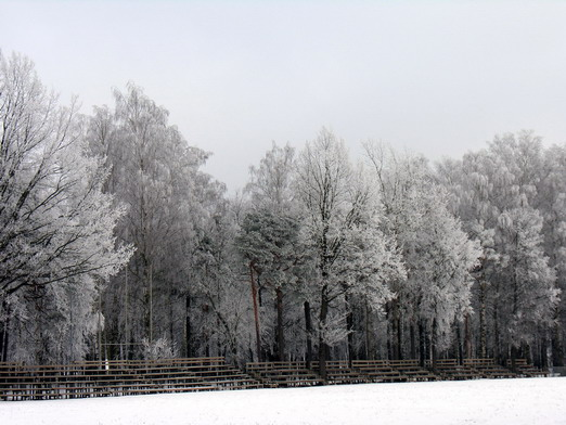 Žiema Foto: User:Algirdas, 2006 m. sausio 17 d.